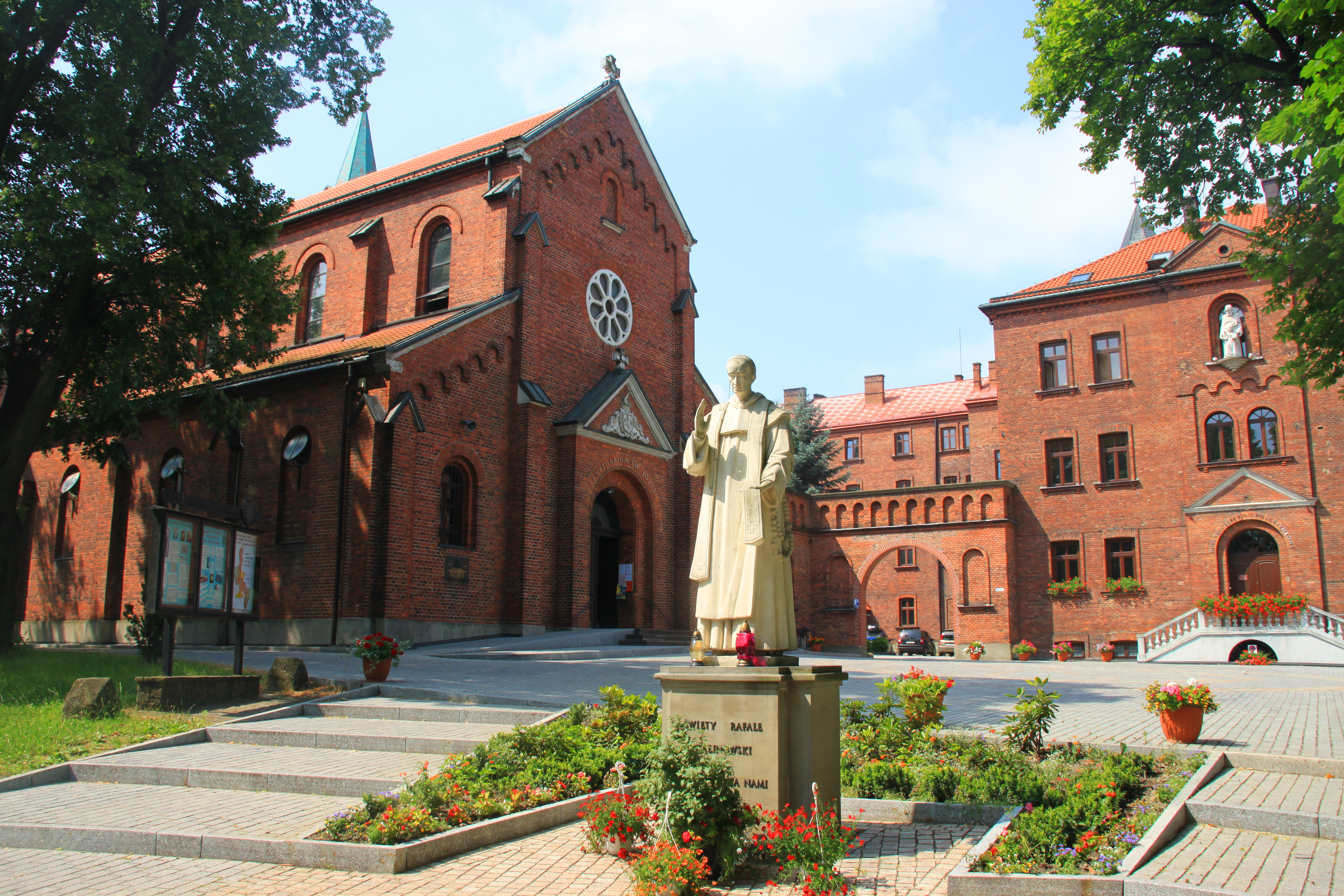 Klasztor Ojców Karmelitów Bosych i Sanktuarium św. Józefa w Wadowicach